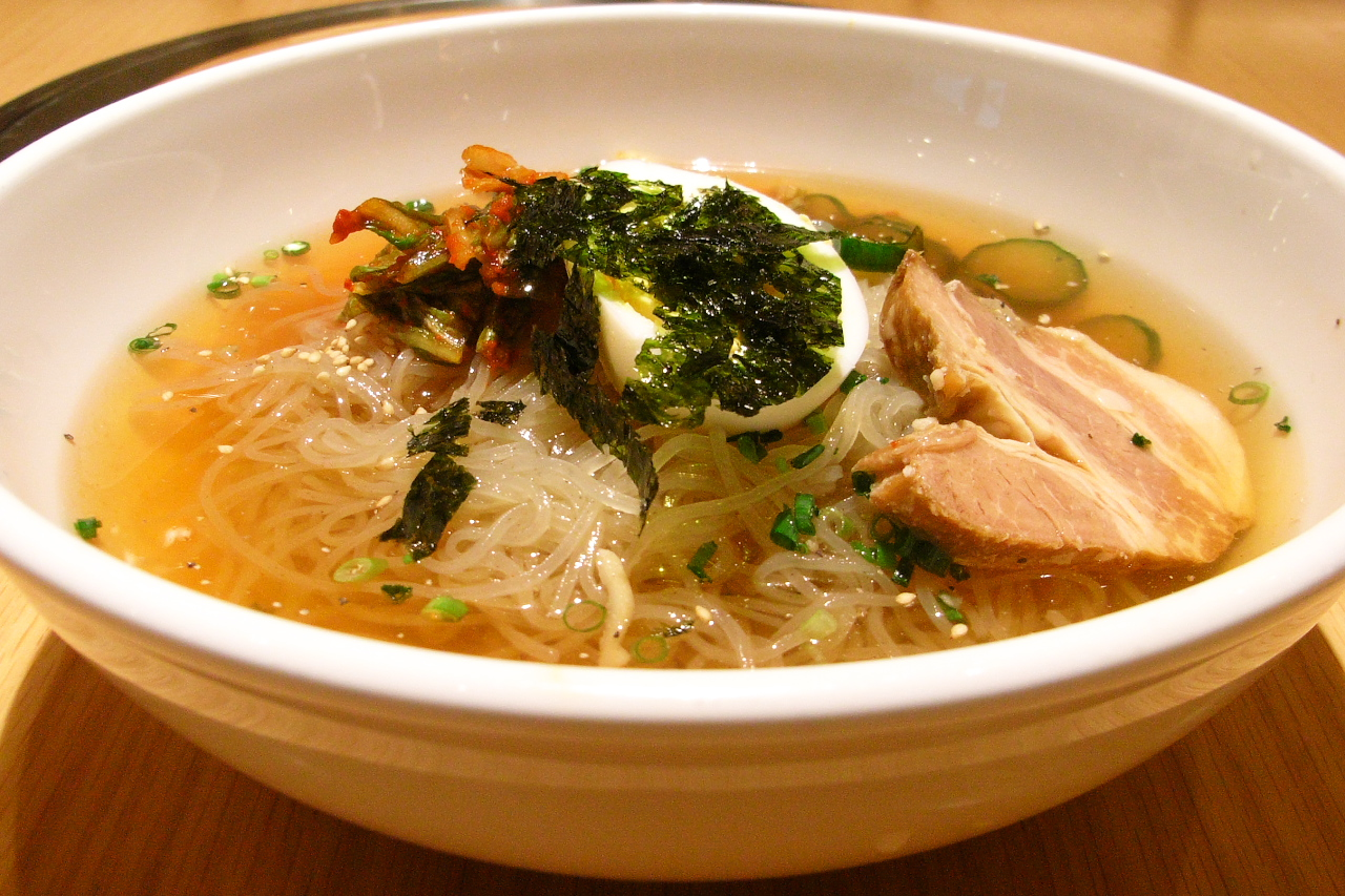 羽田空港に撮影に行ったので、腹ごなしに大ターミナルにある焼肉トラジで冷麺を食べました。冷麺 @羽田空港第1ターミナル・焼肉トラジ